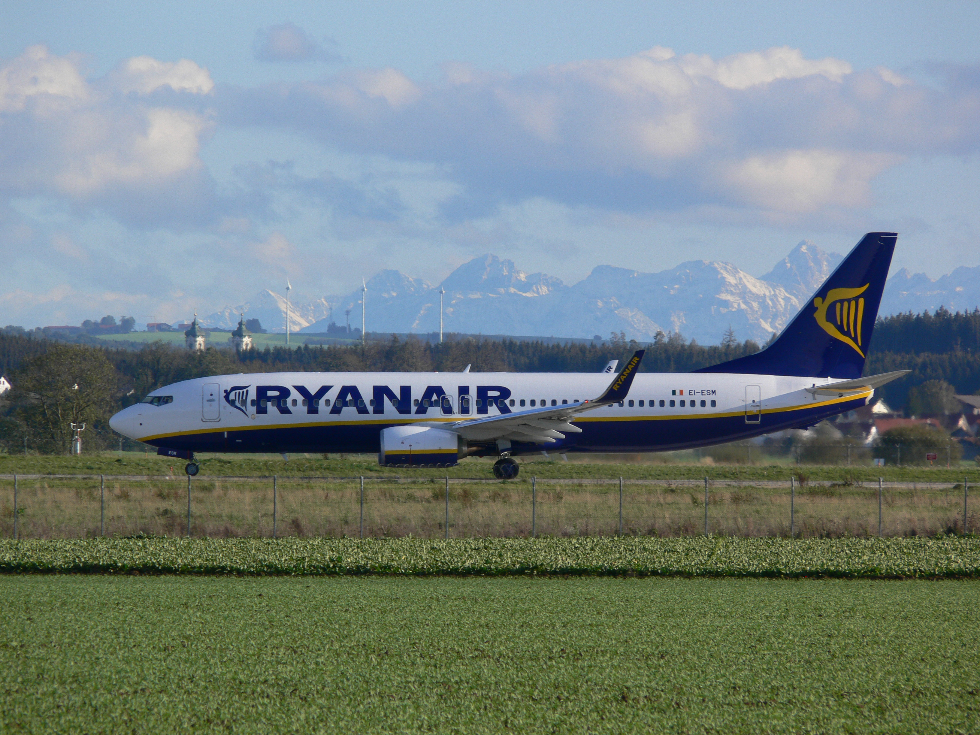 Ryanair EI-ESM am Flughafen Memmingen am 08.04.2012